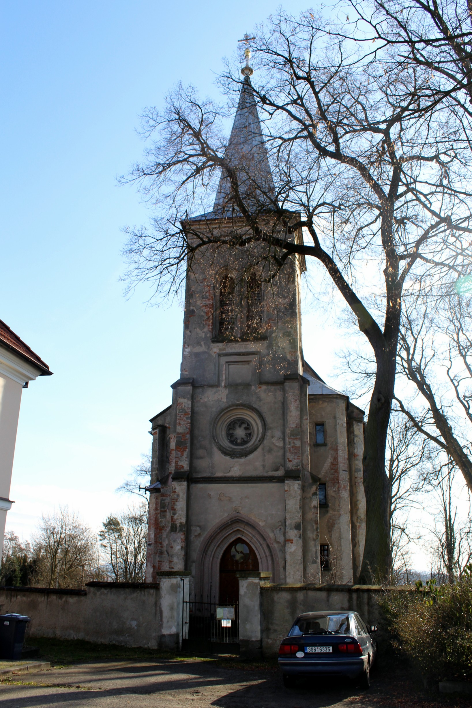 Kostel Narození Panny Marie